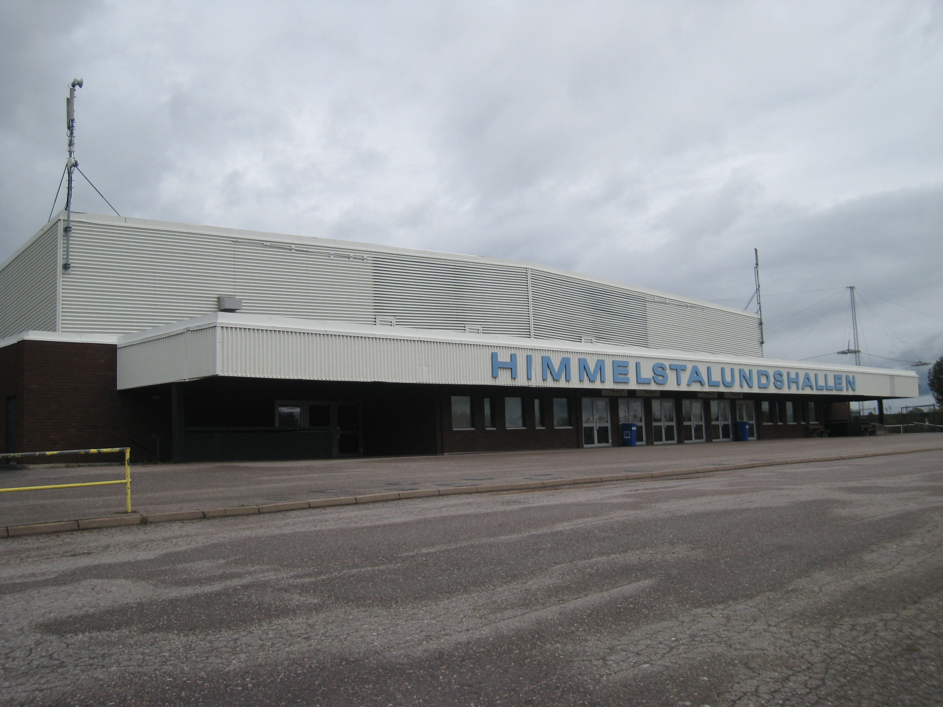 Himmelstalundshallen leasure centre at Himmelstalund, Norrköping, Sweden